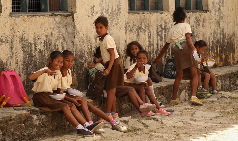 Schulmädchen in Ossu